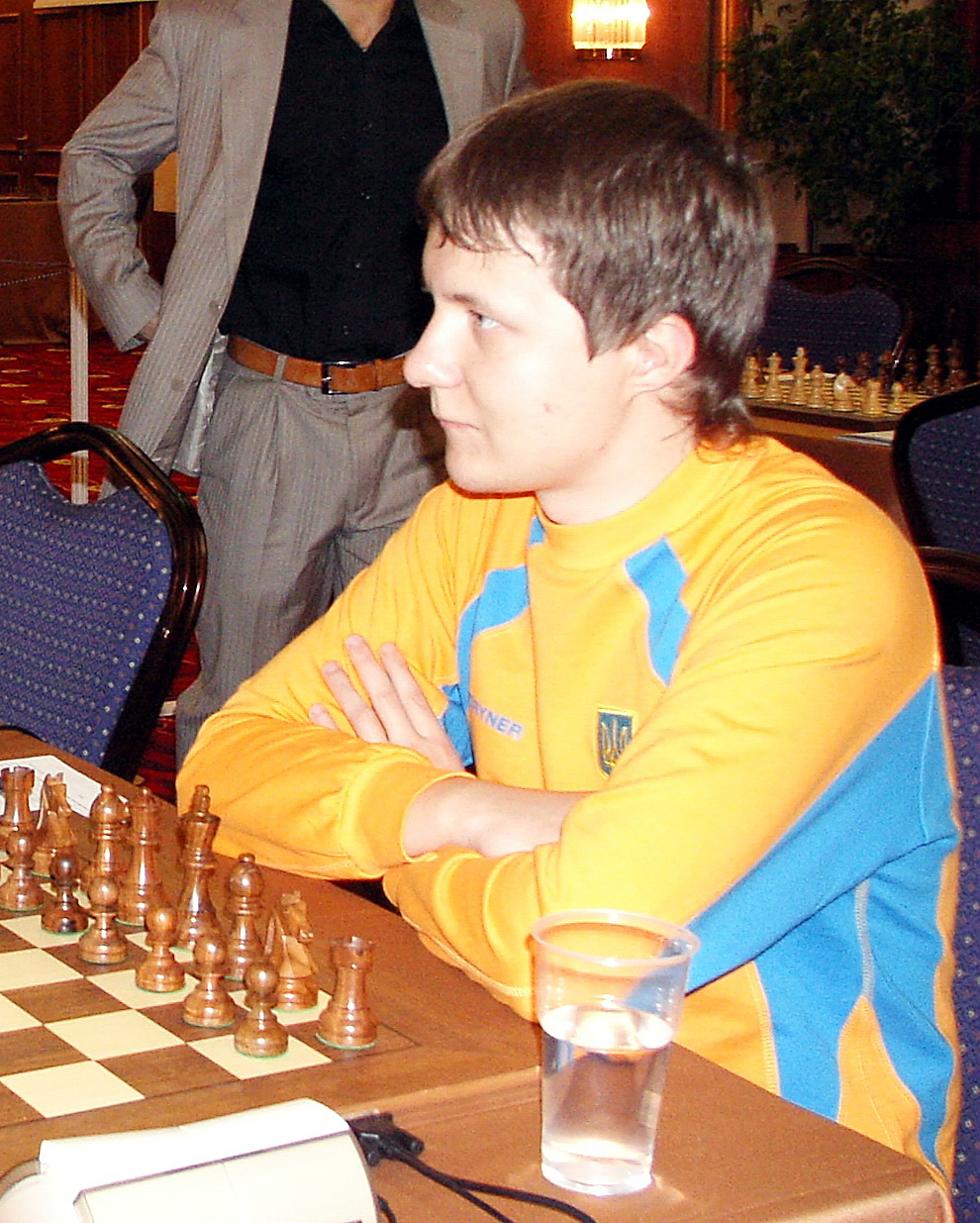 GM Alexander Areshchenko Ukraine, Iraklion 2007